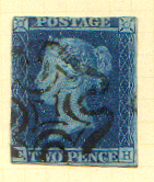 GB 2d Blue Postage Stamp (1841)